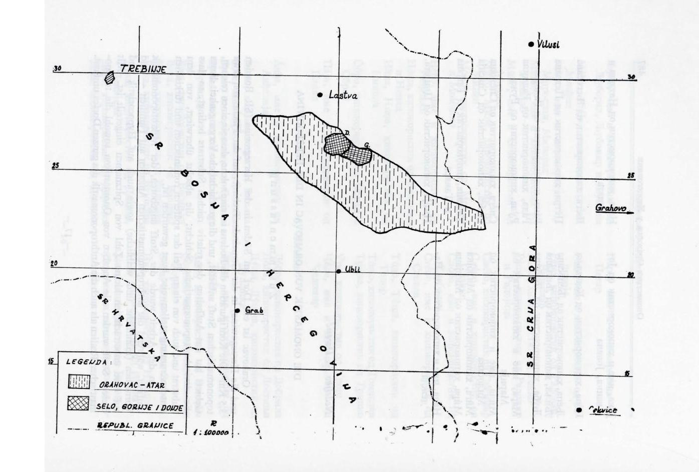 Српски (ћирилица): Мапа Оровца